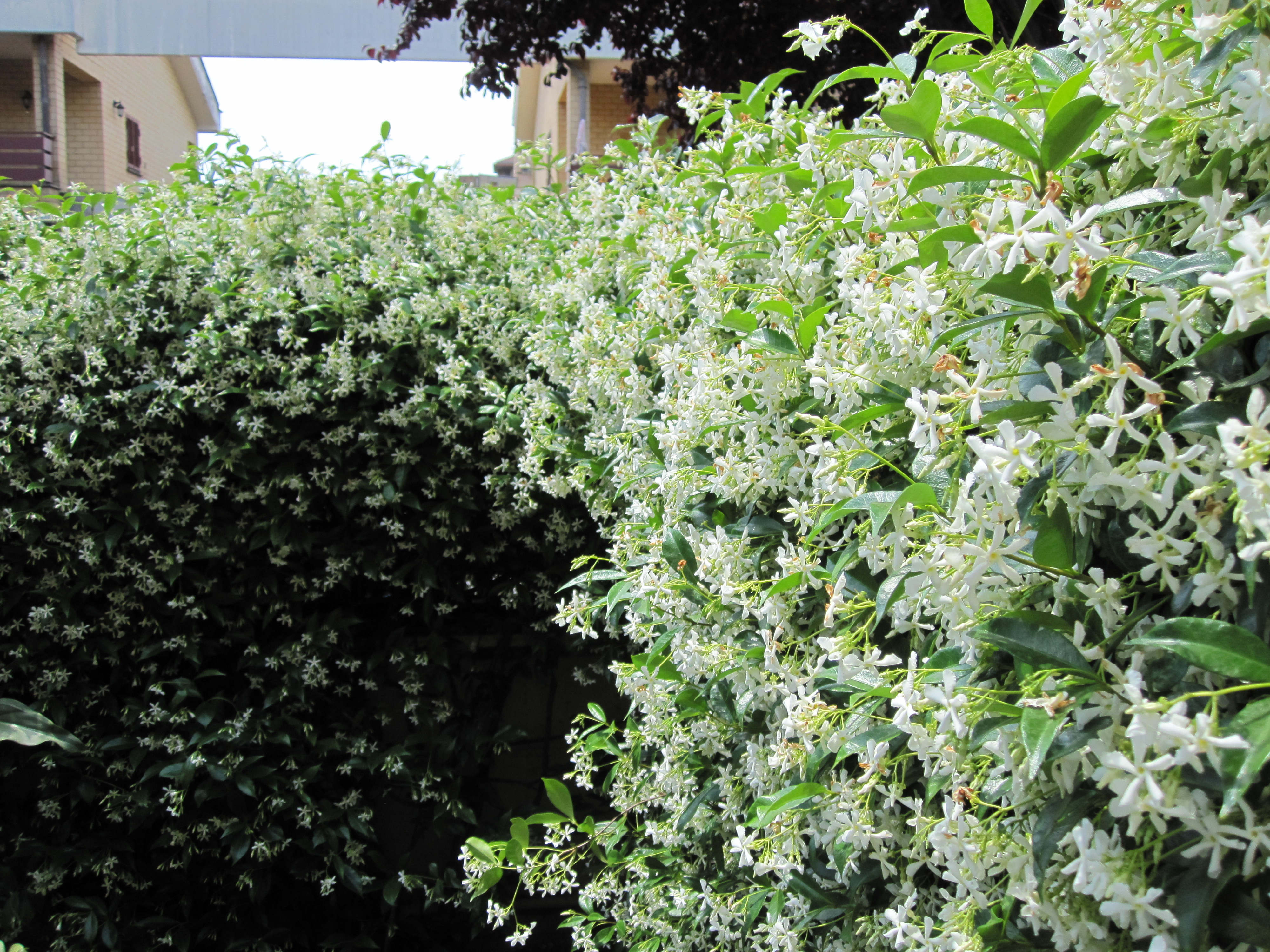 Una siepe di trachelospermum jasminoides